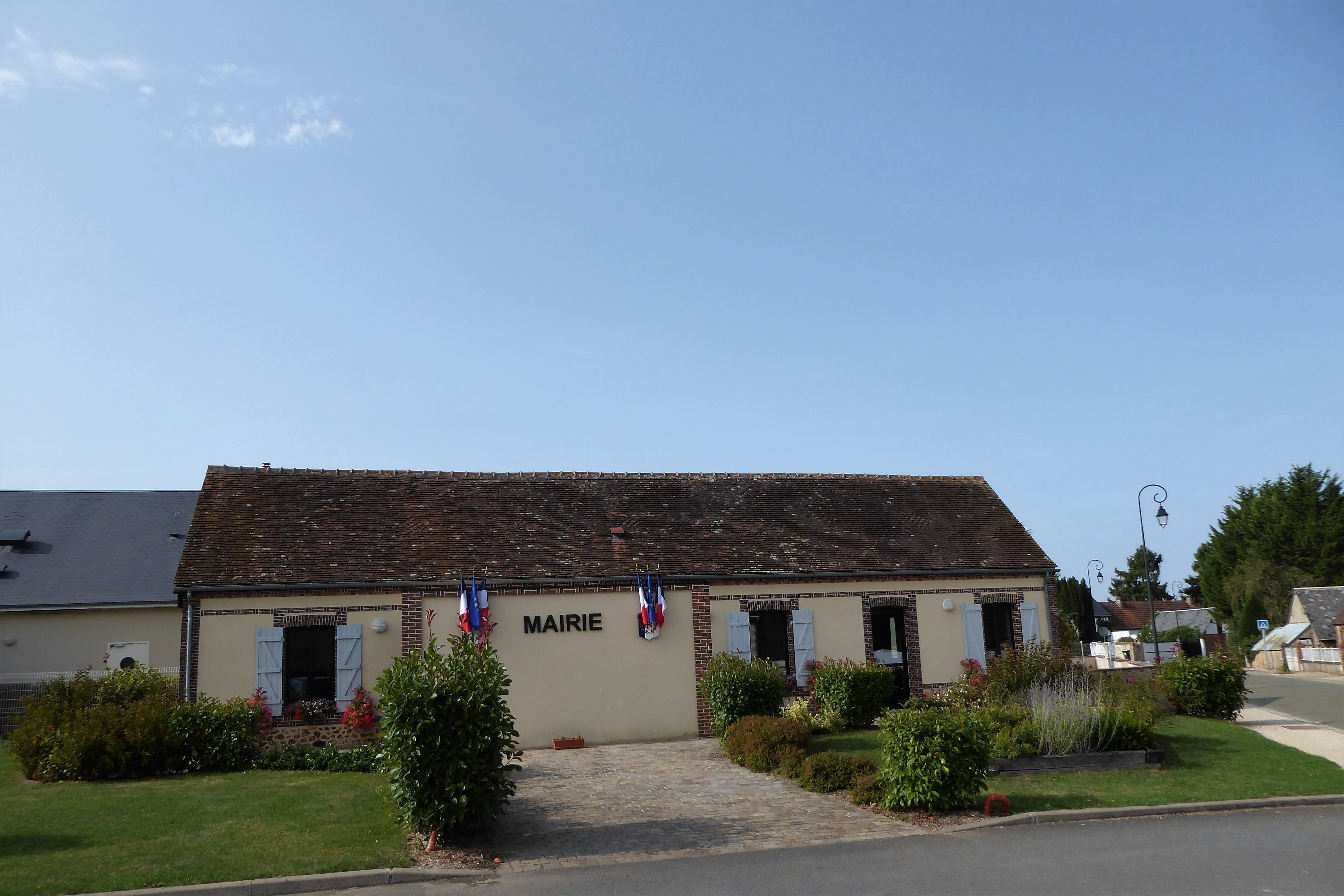 mairie, Le Thieulin, Eure-et-Loir (France).